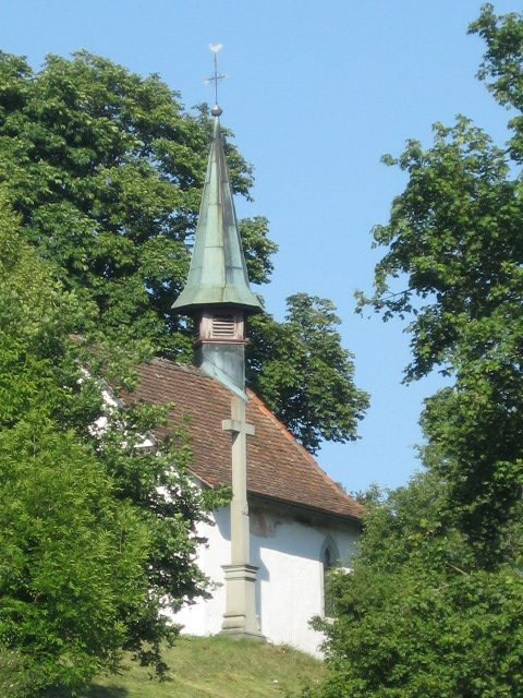 KAPPELE